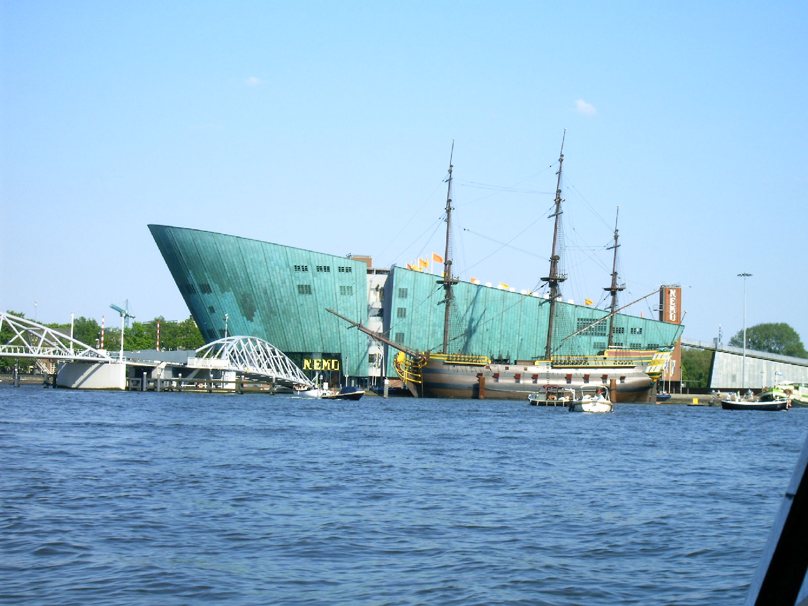 Nemo amsterdam